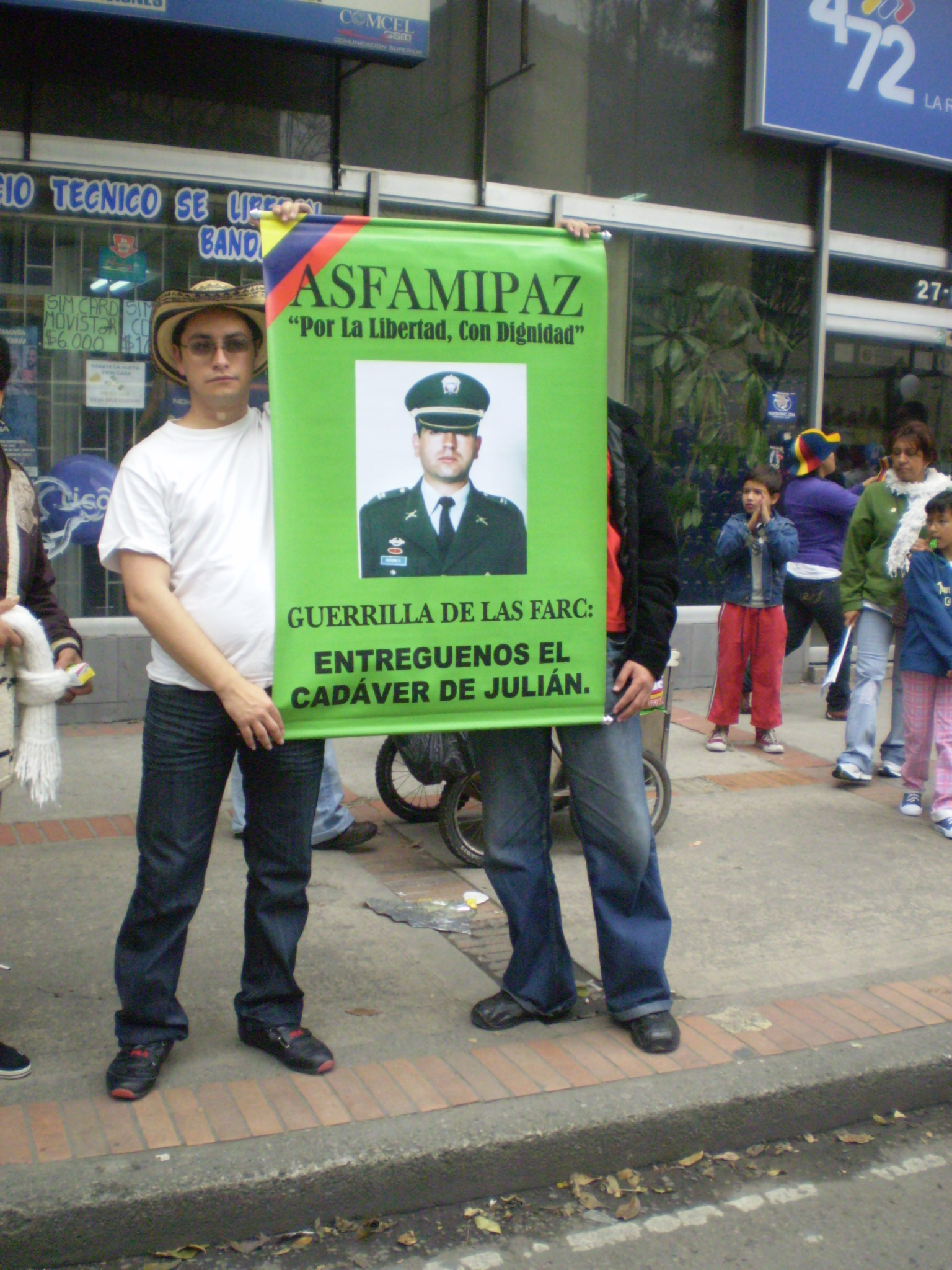 Marcha 20 de julio en Bogota. Foto: Julián Ortega Martínez / equinoXio